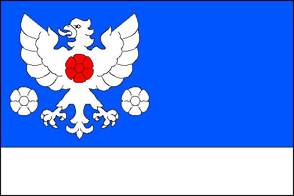 Vlajka obce Rusín